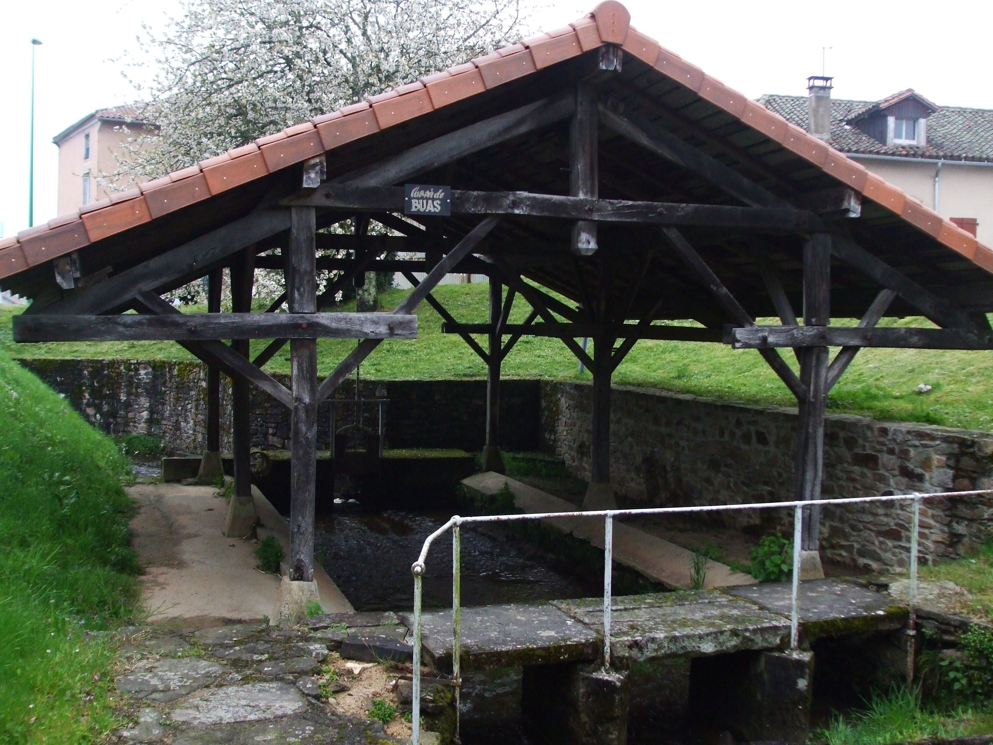 Lavoir de Buas sur la Tardoire à Châlus, (Haute-Vienne, France)